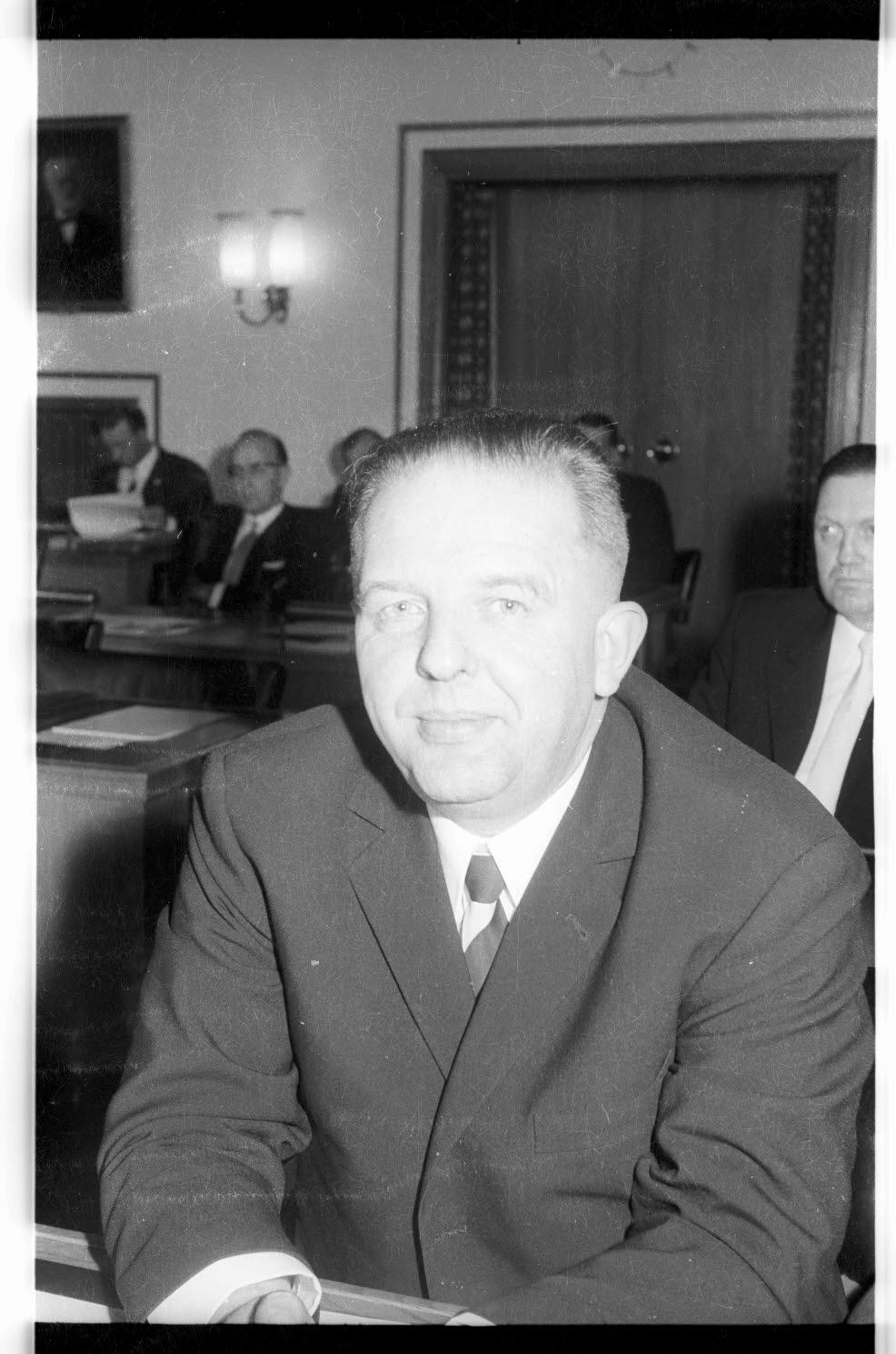 als neuer CDU-Fraktionchef in der Ratsversammlung nach der Kommunalwahl 1966.